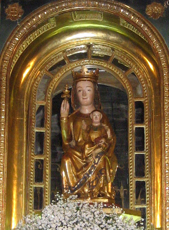 Talla en madera policromada y dorada de la Virgen de Muskilda en Ochagavía (Navarra) Spain